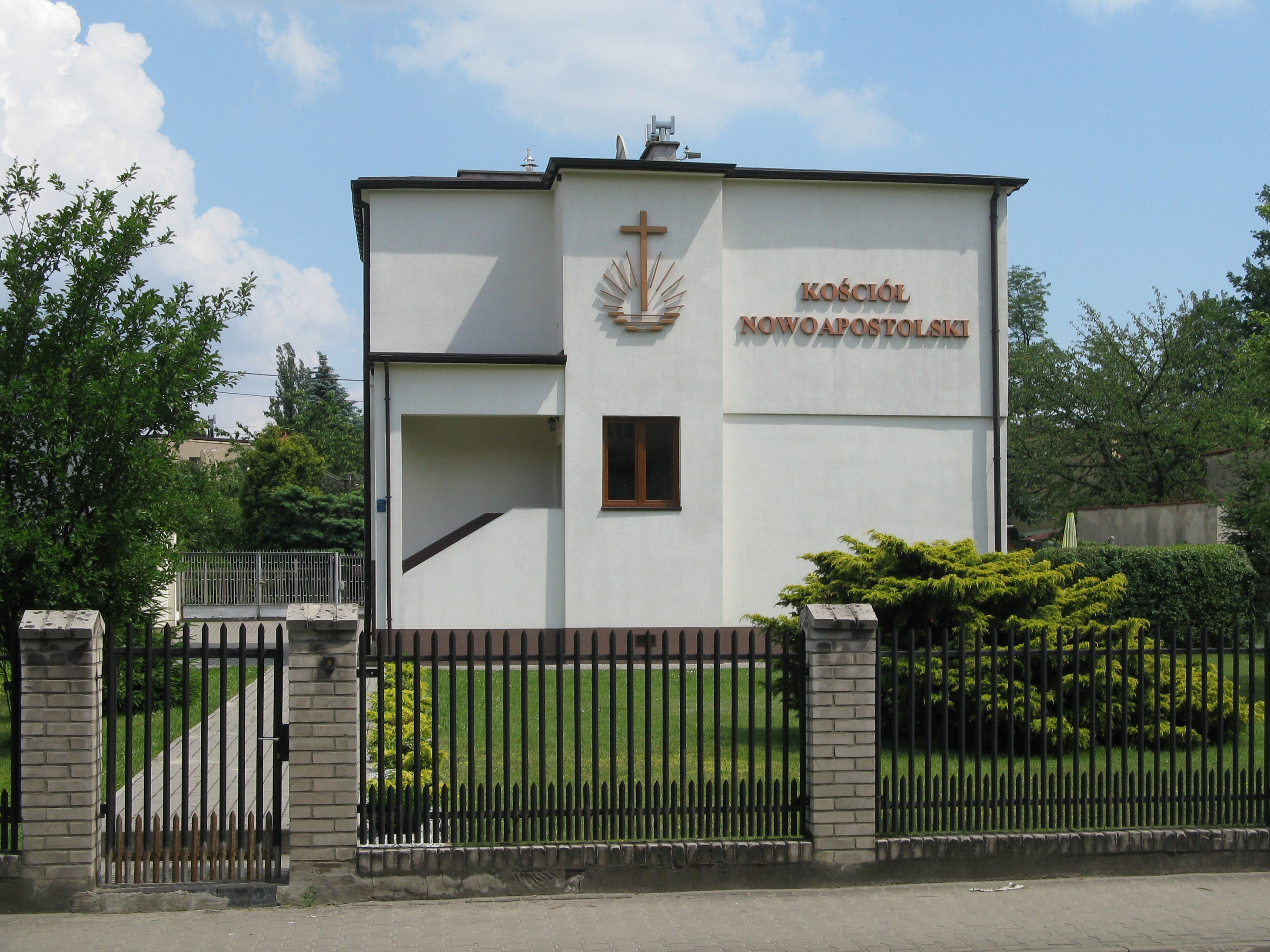 Zbór Kościoła Nowoapostolskiego w Chorzowie, ul. Jodłowa 24.